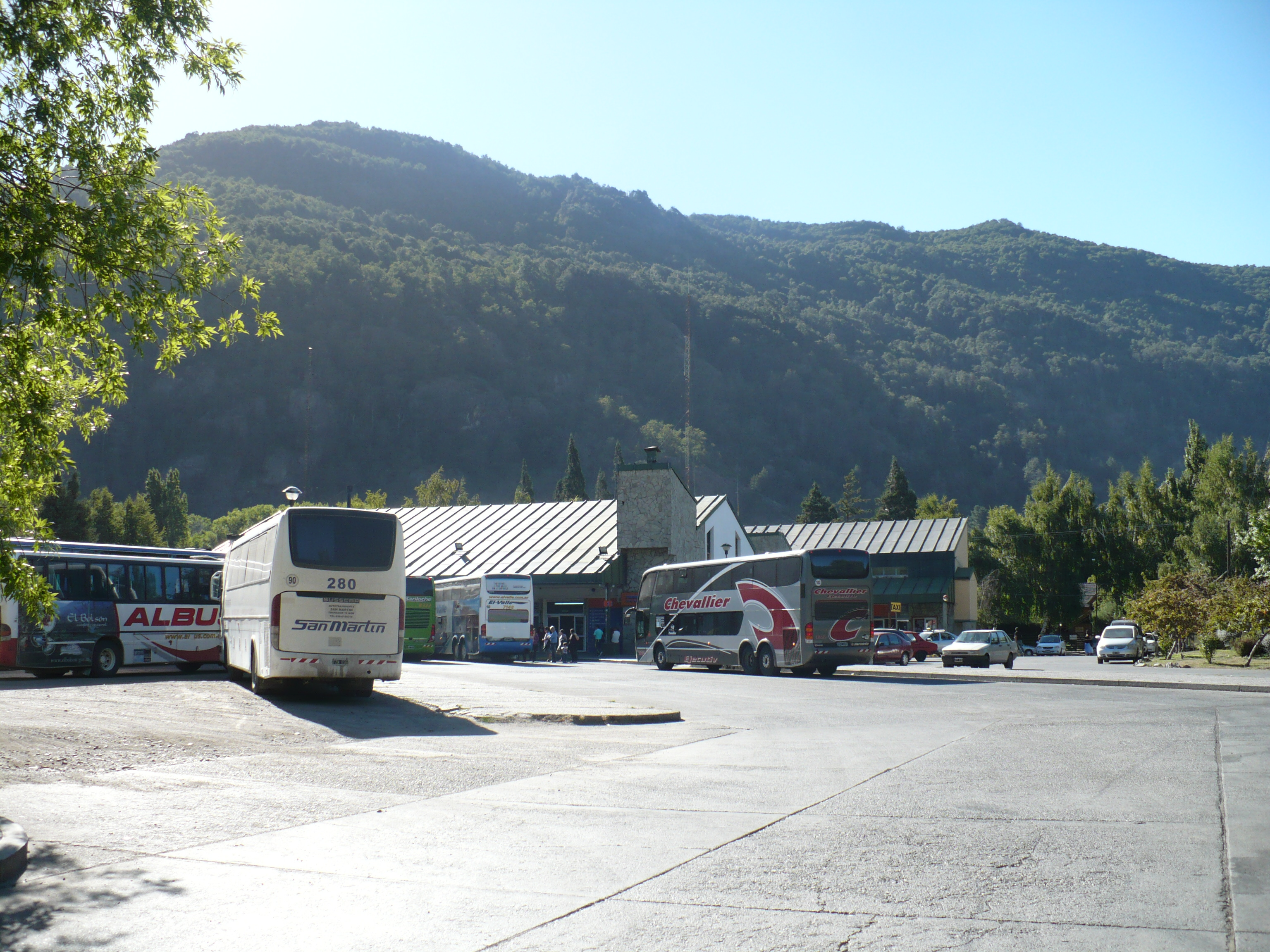 Vista de Terminal de Ómnibus de San Martín de los Andes Argentina